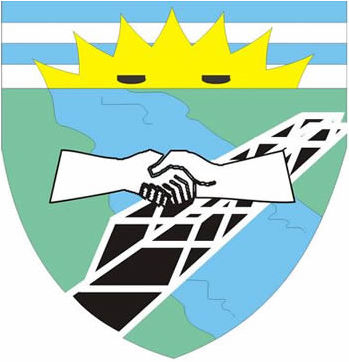 Escudo de Armas de la Ciudad de Clorinda (Formosa)